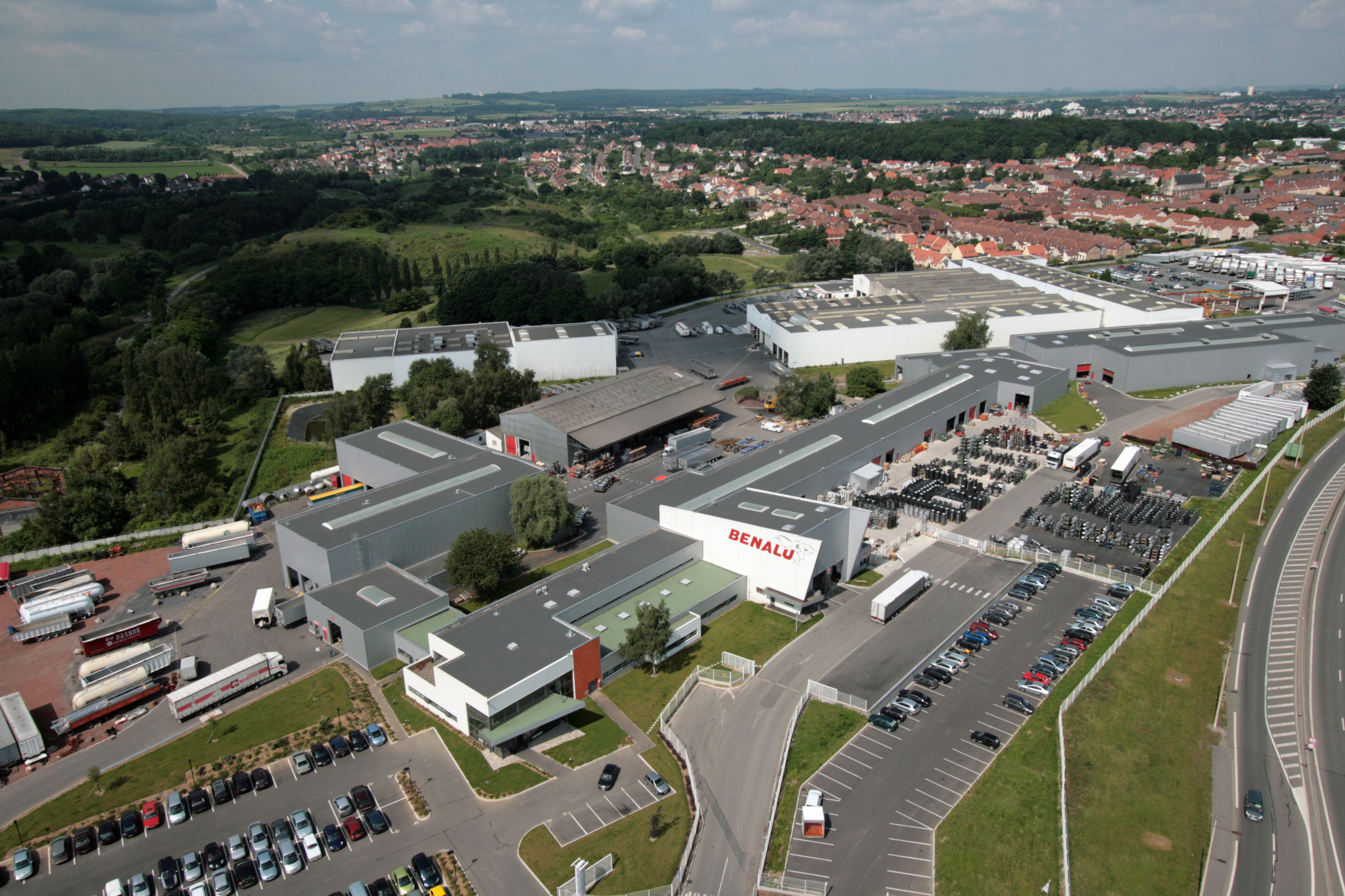 Vue extérieure de l'usine Benalu Liévin